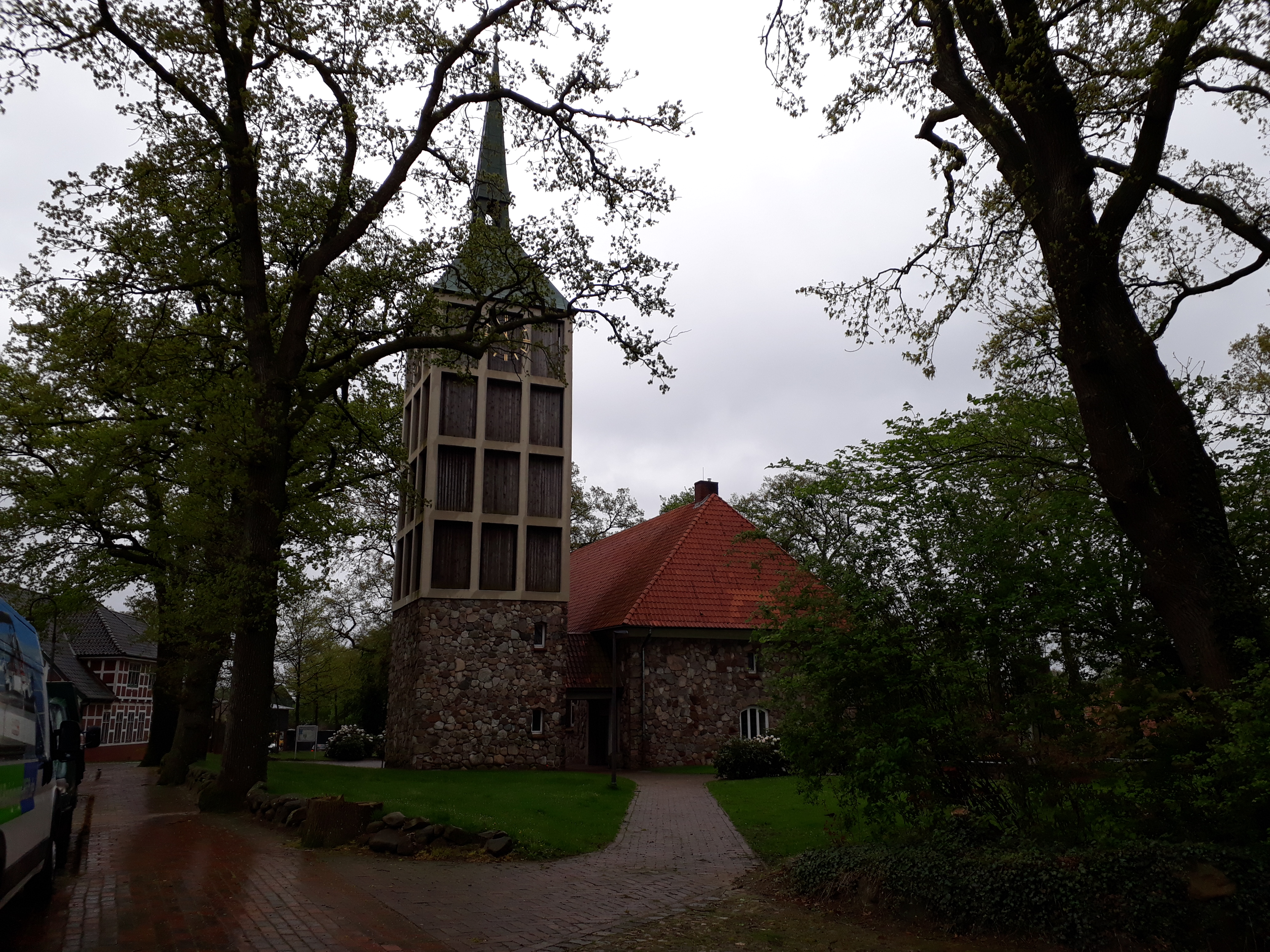 St. Primus Kirche Bargstedt, Kreis Stade (Nds.)